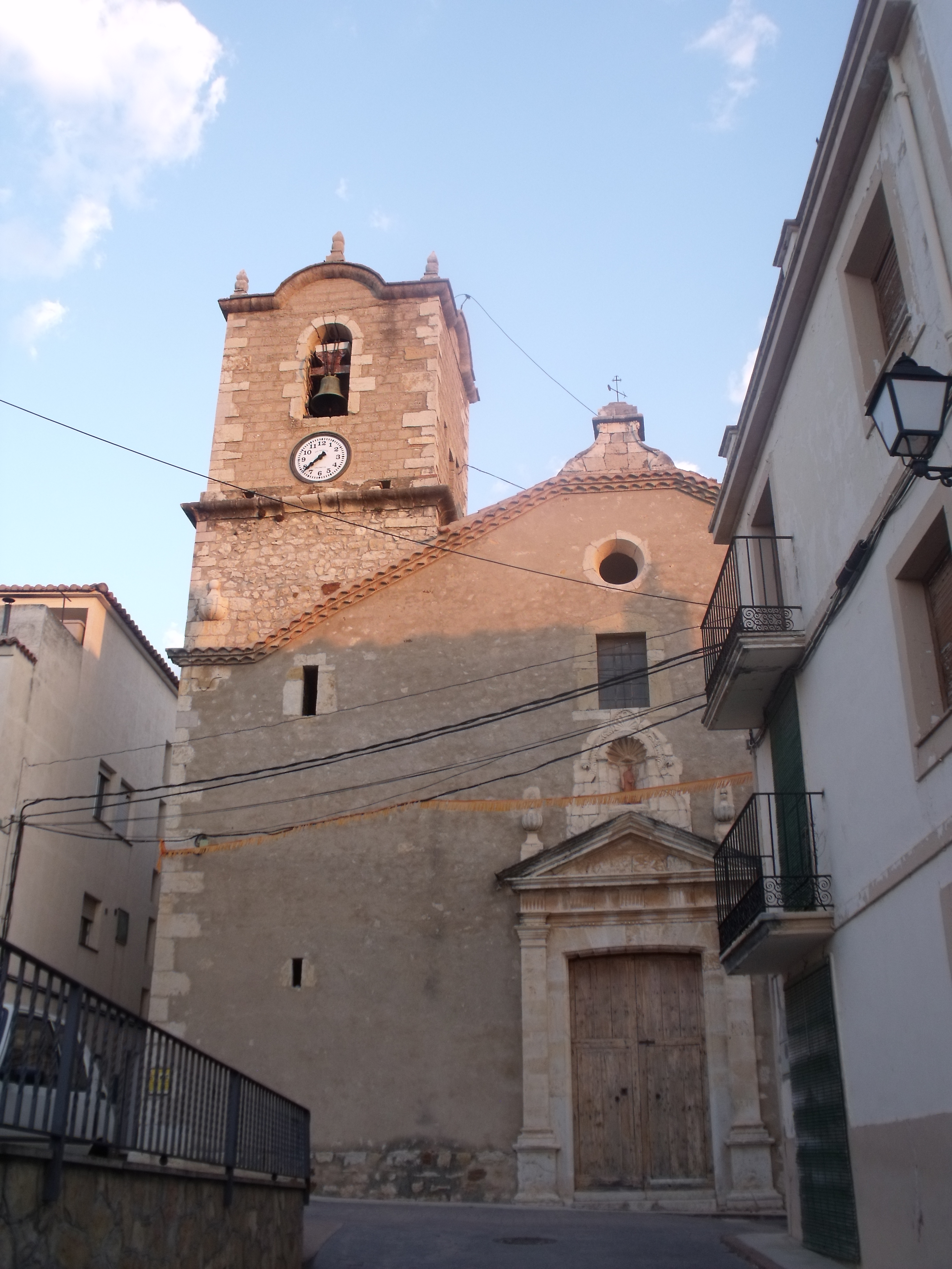 Església parroquial de la Purificació.